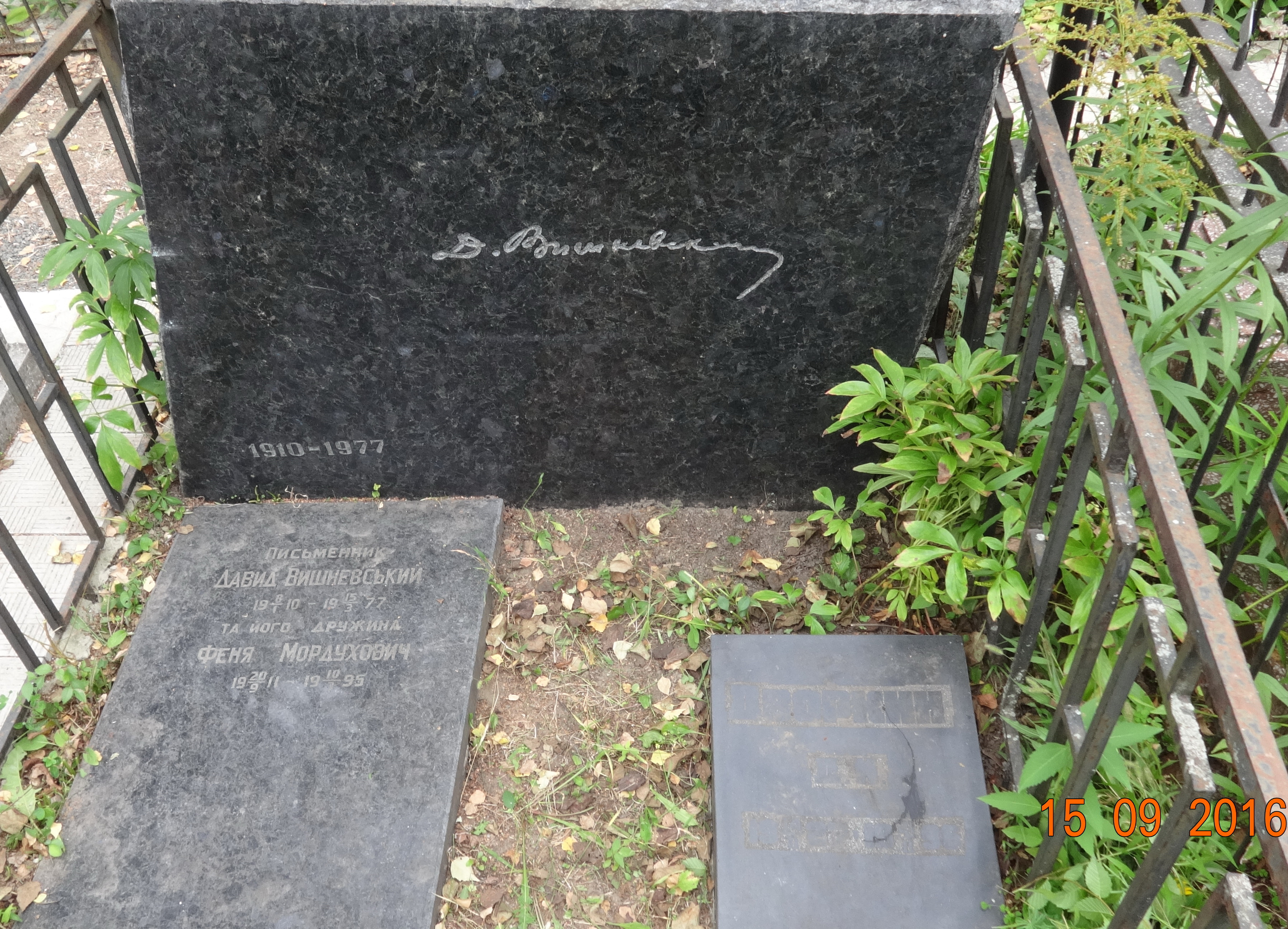 Могила Вишневського Д.К., письменника, Харків, вул. Клочківська, 335, 9-е міське кладовище (20 квартал)